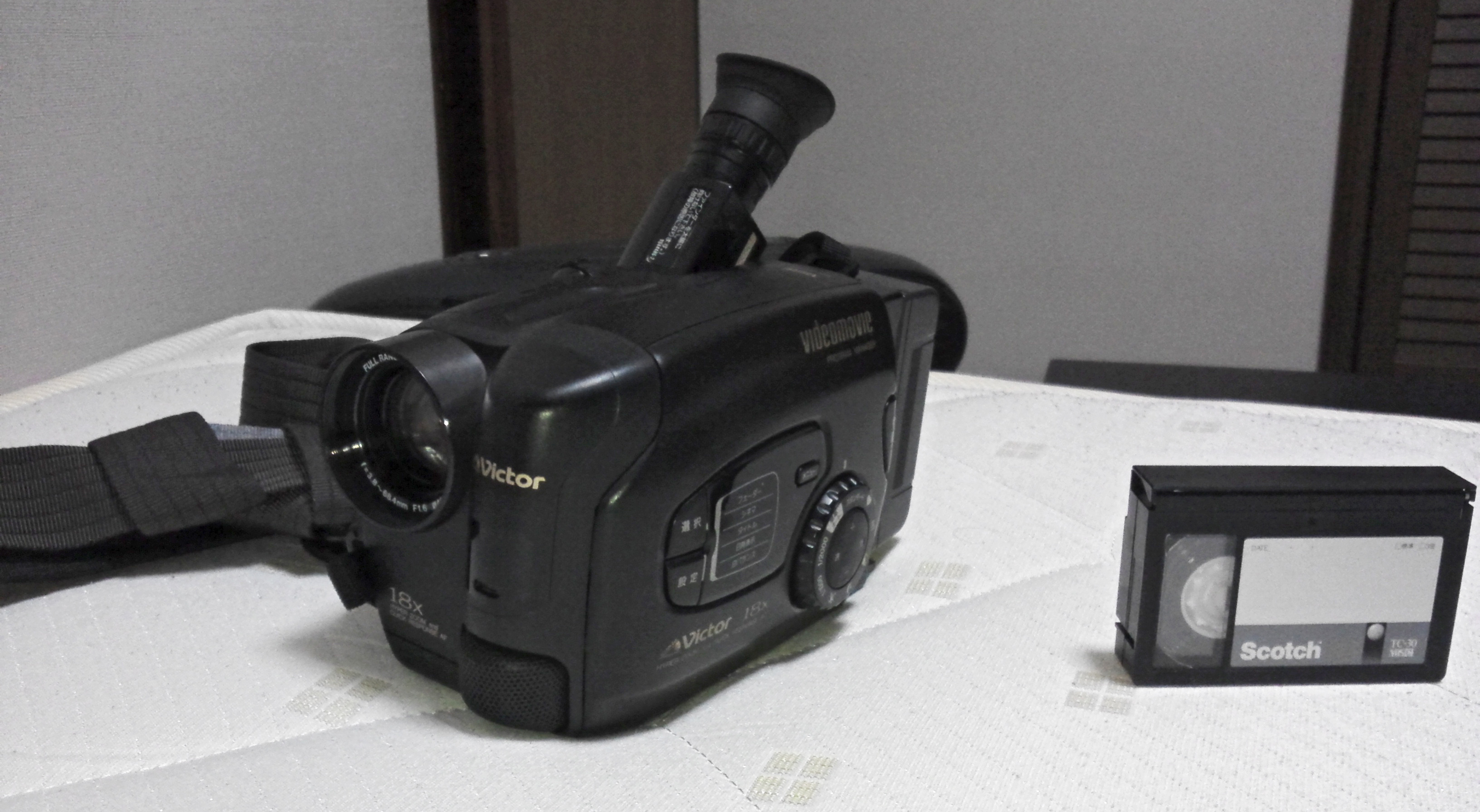 撮影者所有のビデオムービーです。